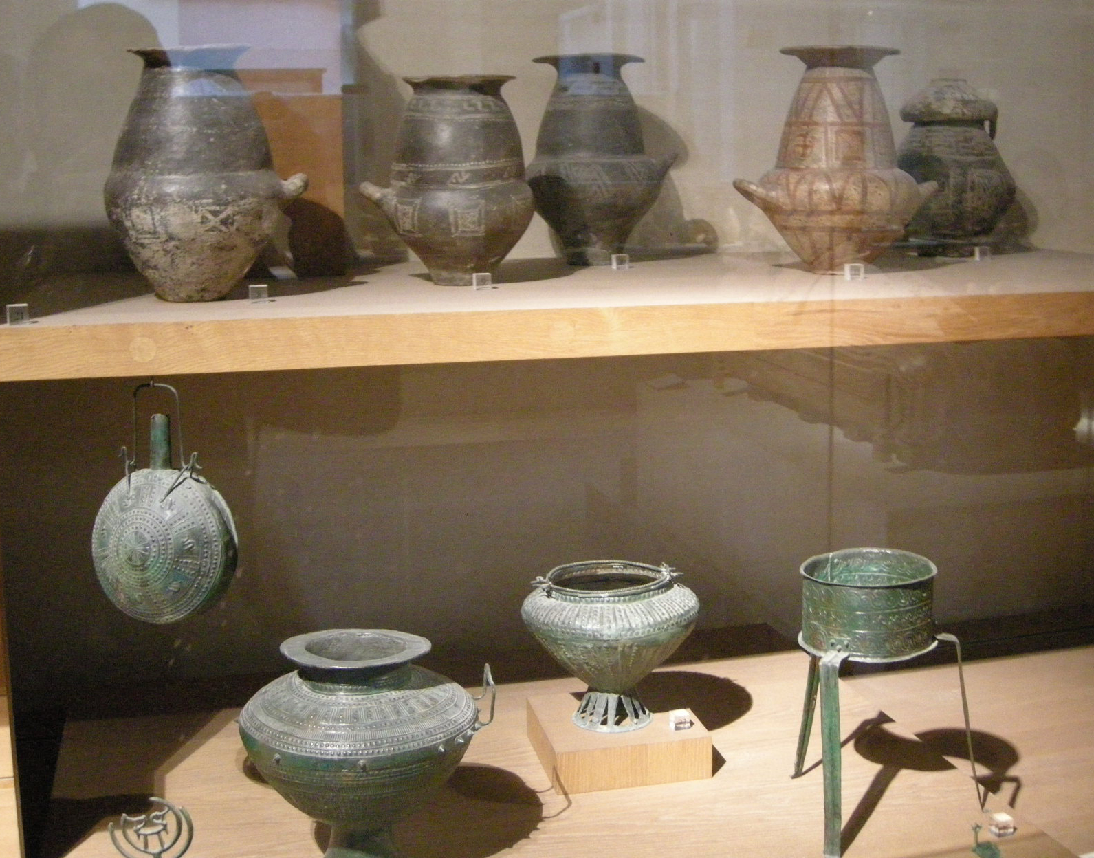 Louvre, reperti villanoviani.JPG